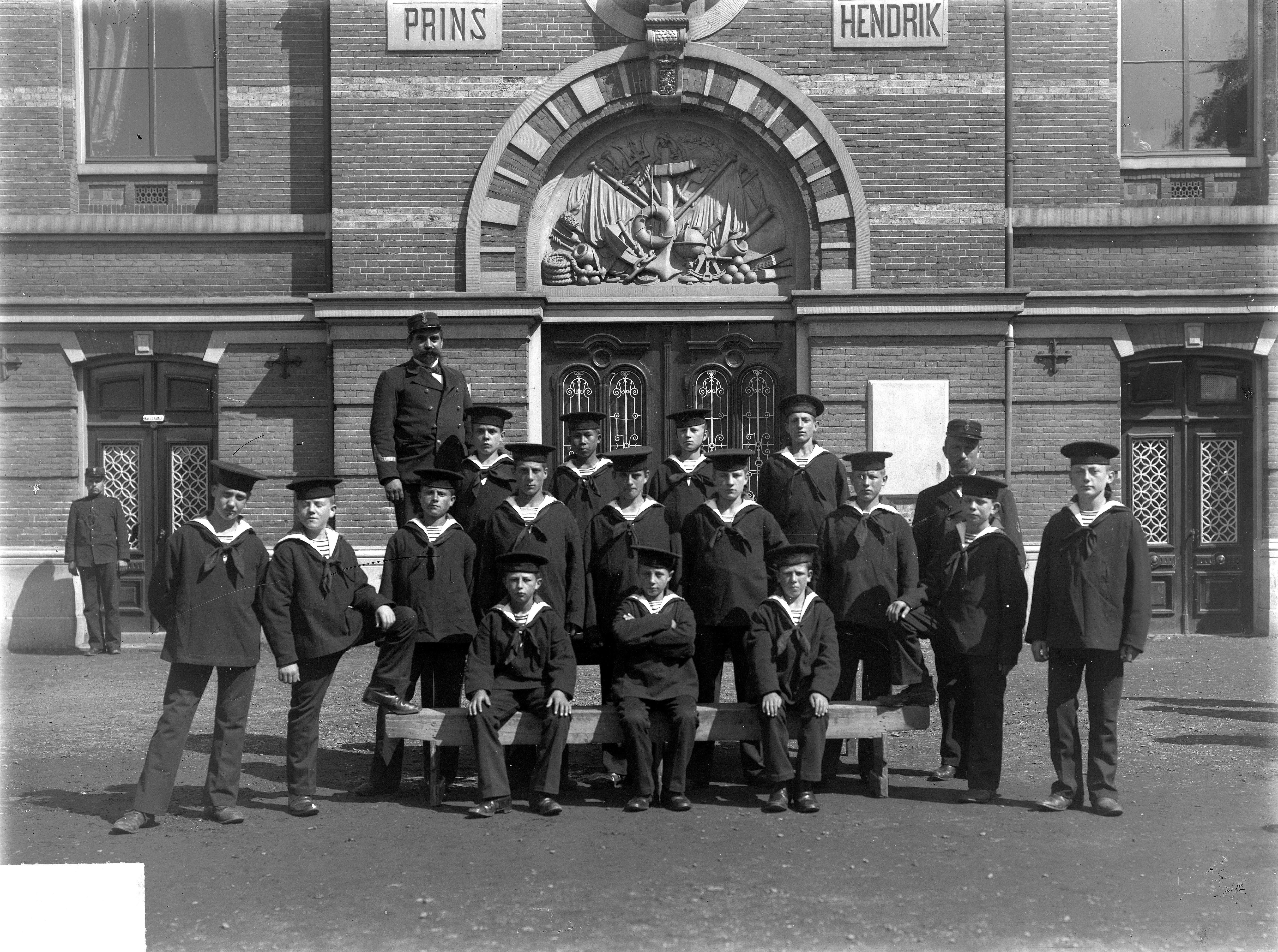 Groepsportret van leerlingen van de Kweekschool voor Zeevaart voor het schoolgebouw. In de gevel zeevaartattributen en de portretbuste van Prins Hendrik de Zeevaarder. Tekst op de gevel: Prins Hendrik.